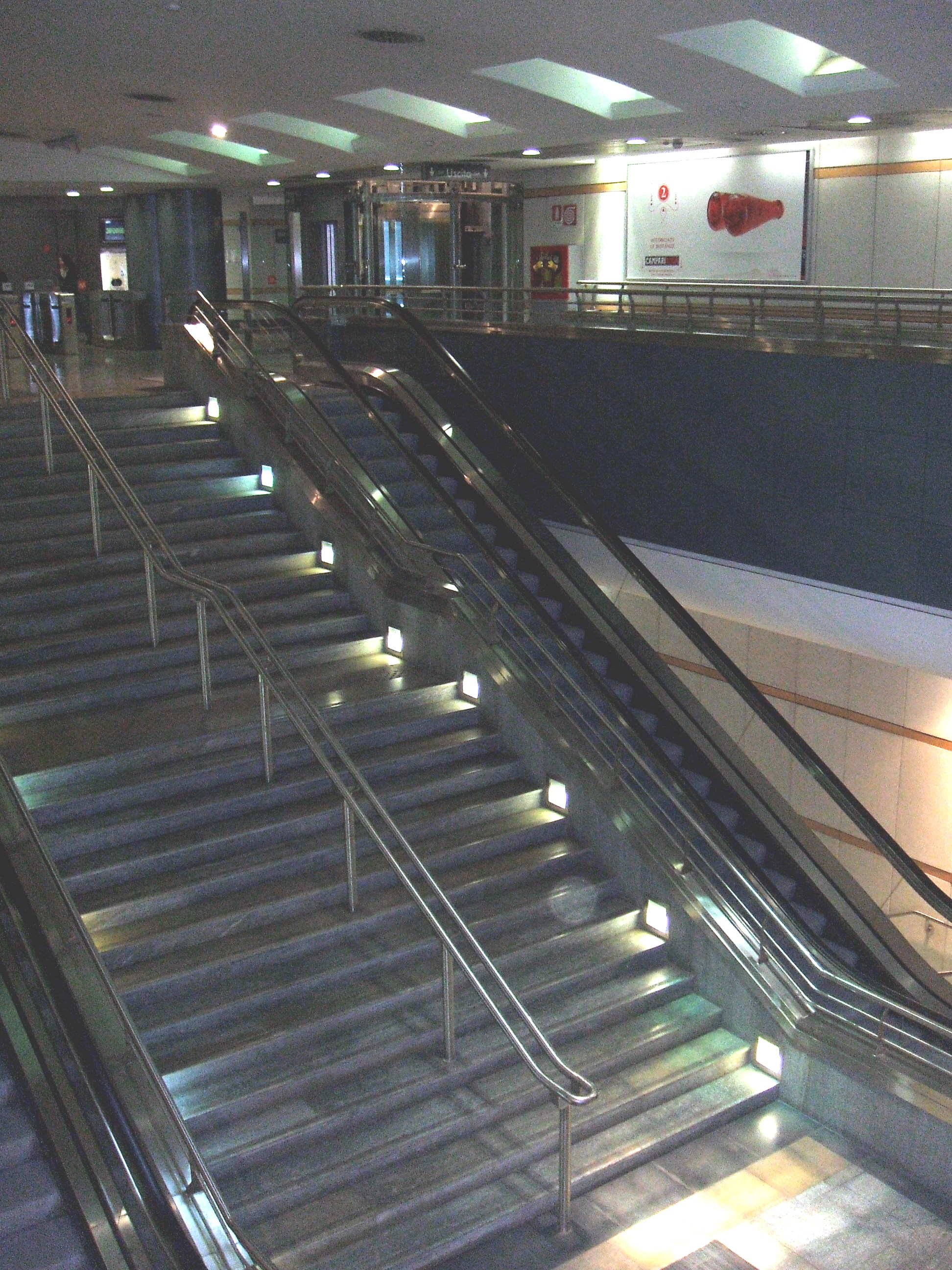 Lo scalone della metropolitana di Torino, alla fermata Rivoli